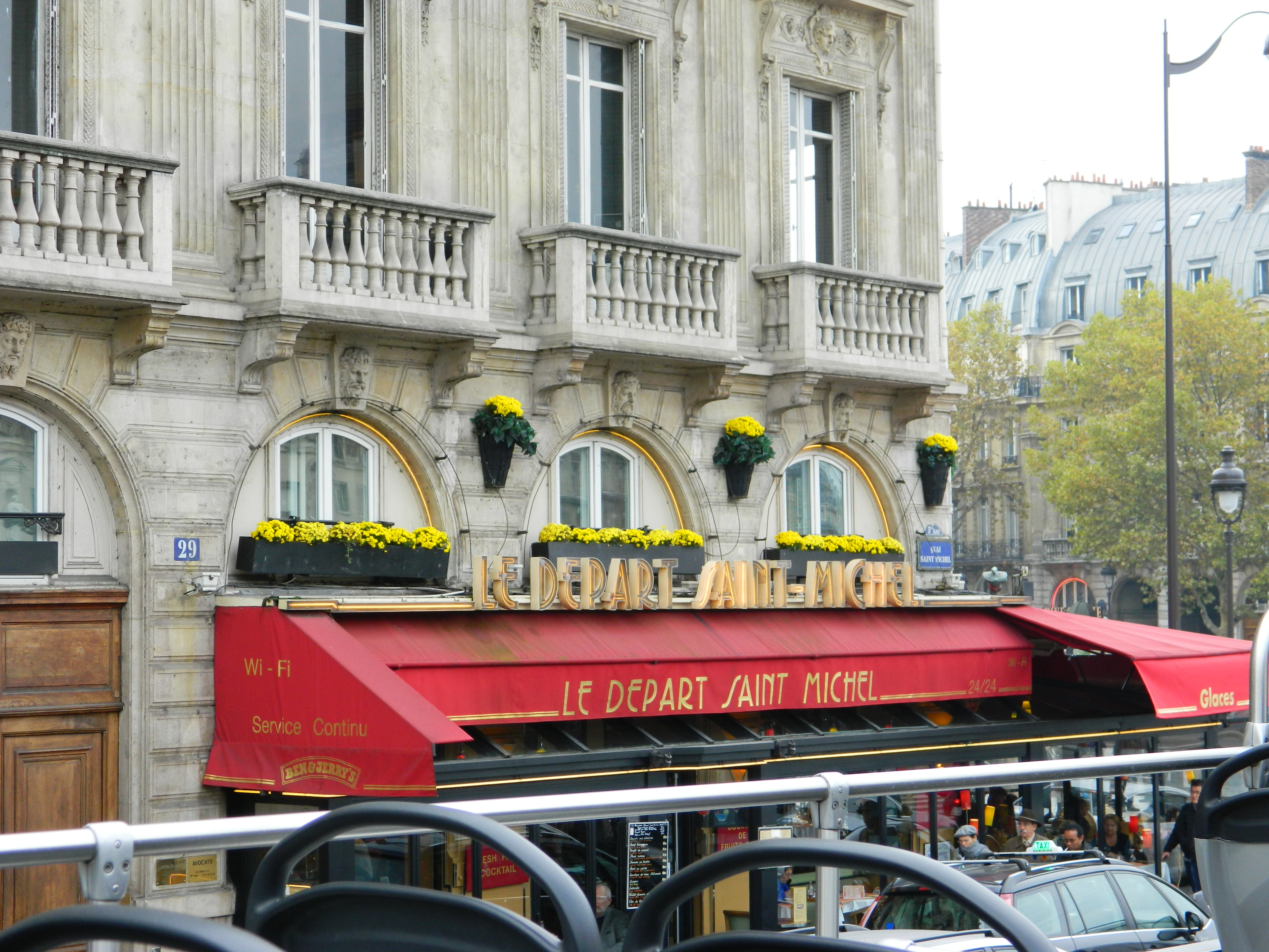 Le Depart Saint-Michel, 1 place Saint Michel, Paris.